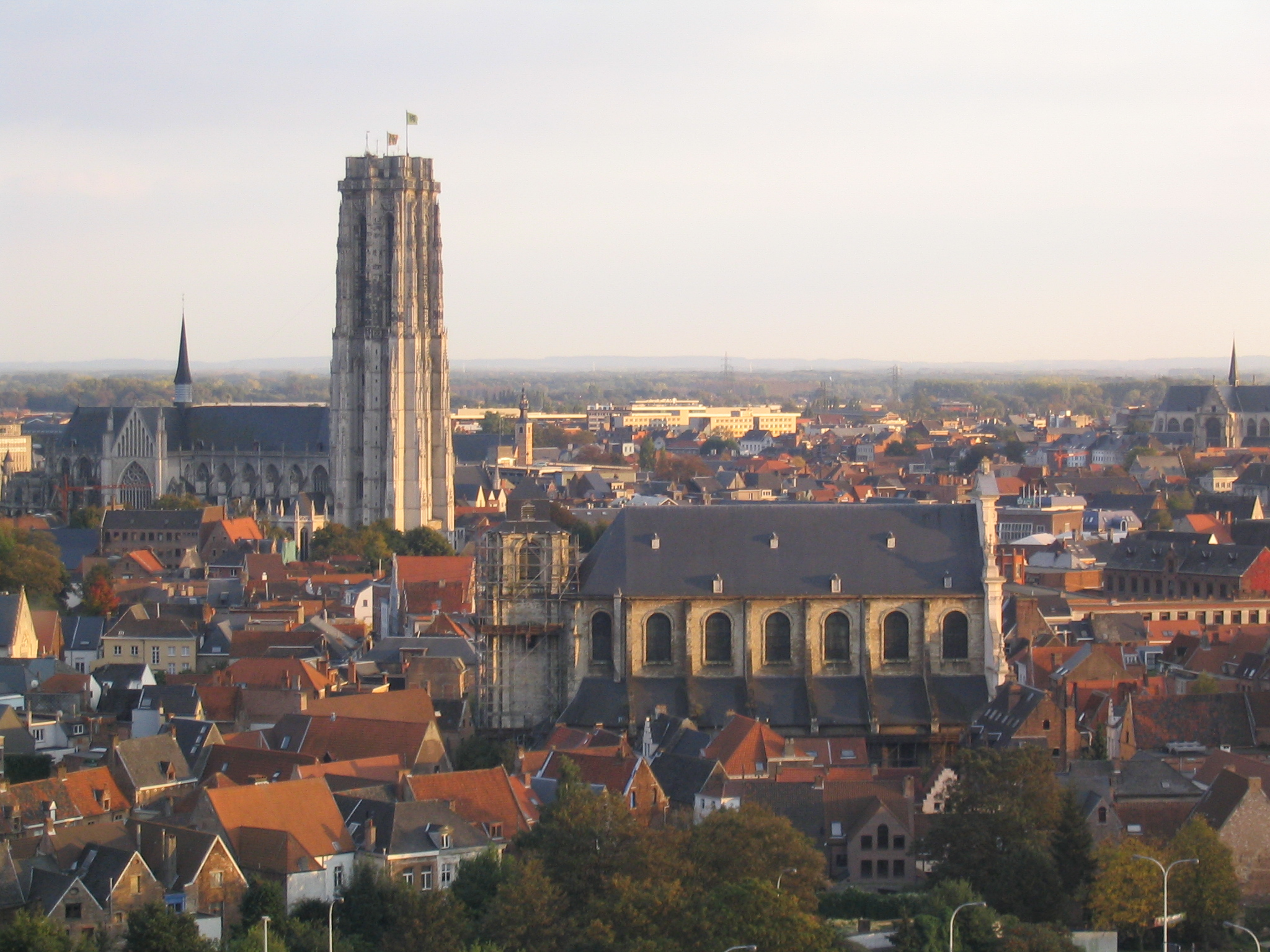 Mechelen vanop een appartementsgebouw op 17 hoog